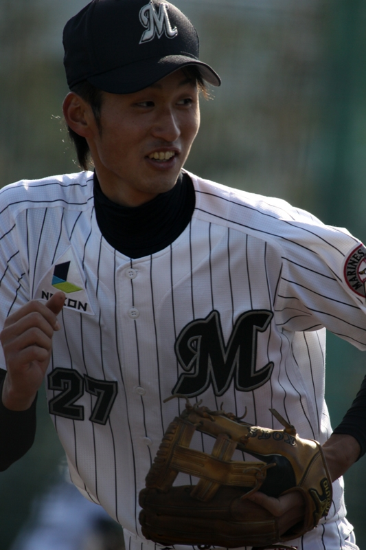 日本プロ野球 千葉ロッテマリーンズ 木本幸広 投手 外野手